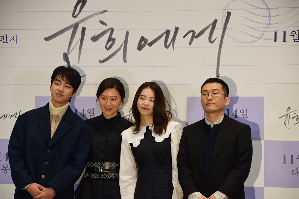 성유빈 김희애 김소혜 임대형 감독 영화 '윤희에게' 시사회 현장 (2019.11.5 서울 롯데시네마건대입구)